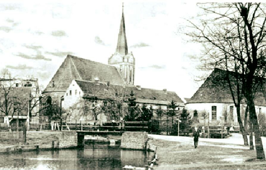 Senftenberg ehemalige Wolschinka Aue, Brandenburg, Deutschland, 1907